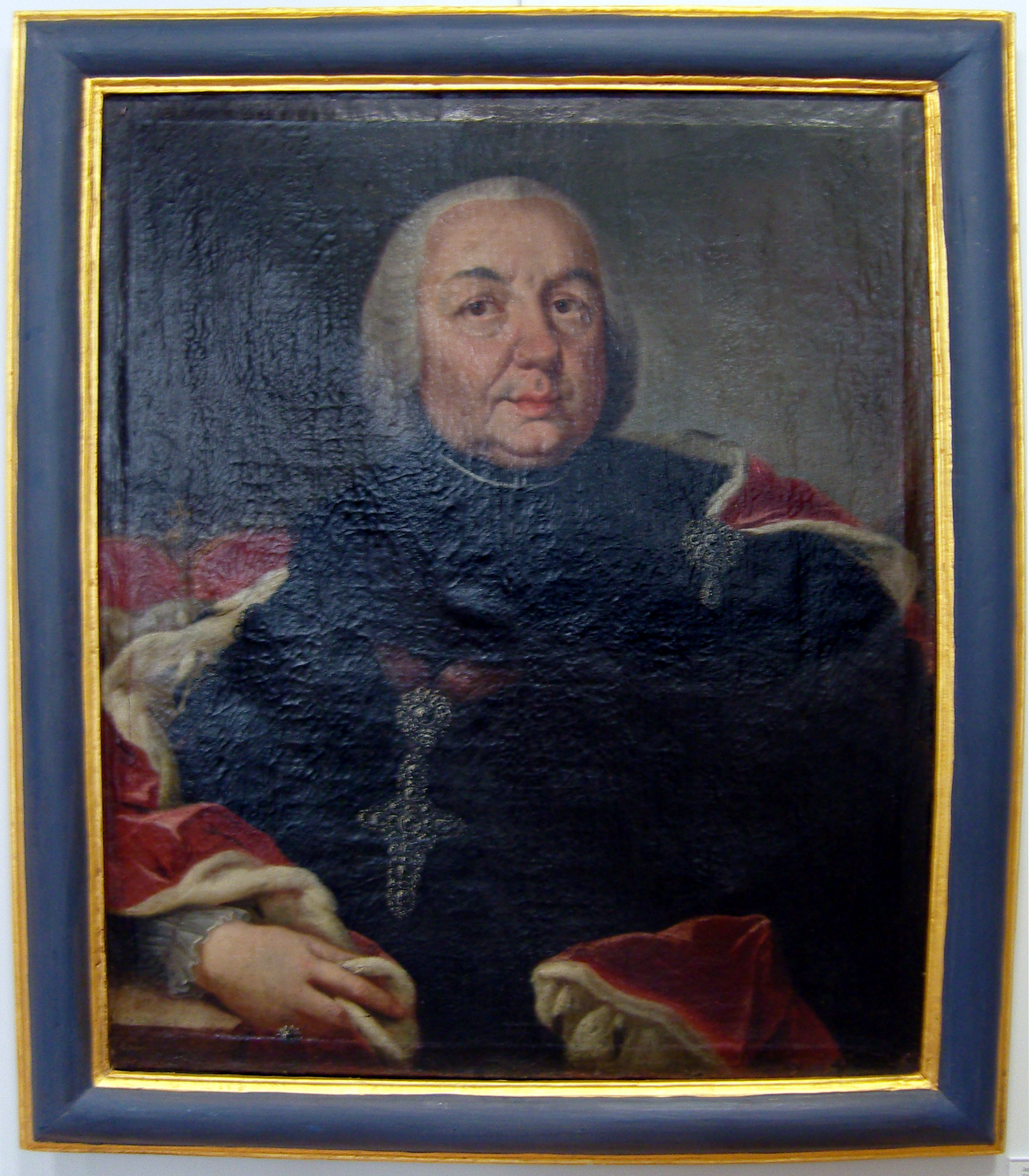 Porträt des Fuldaer Fürstbischof Adalbert von Walderdorff, gemalt von Johann Andreas Herrlein; ausgestellt im Vonderau-Museum in Fulda